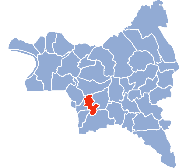 Auteur Hervé SUAUDEAU Licensing Catégorie:Cartes de Seine-saint-Denis Catégorie:Romainville